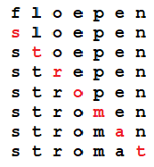 letterwisselspel: door van links naar rechts steeds één letter te vervangen door een andere ontstaat op de diagonaal stap voor stap het nieuwe woord